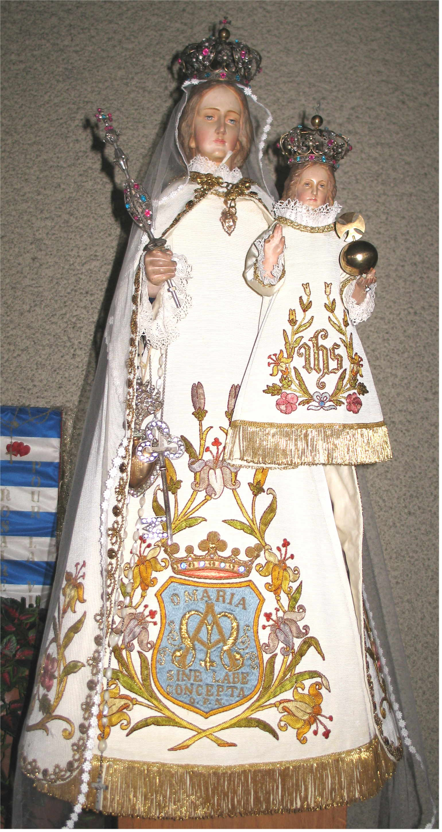 Sujet: Stau vu Maria an der Kierch zu Rued-Sir.